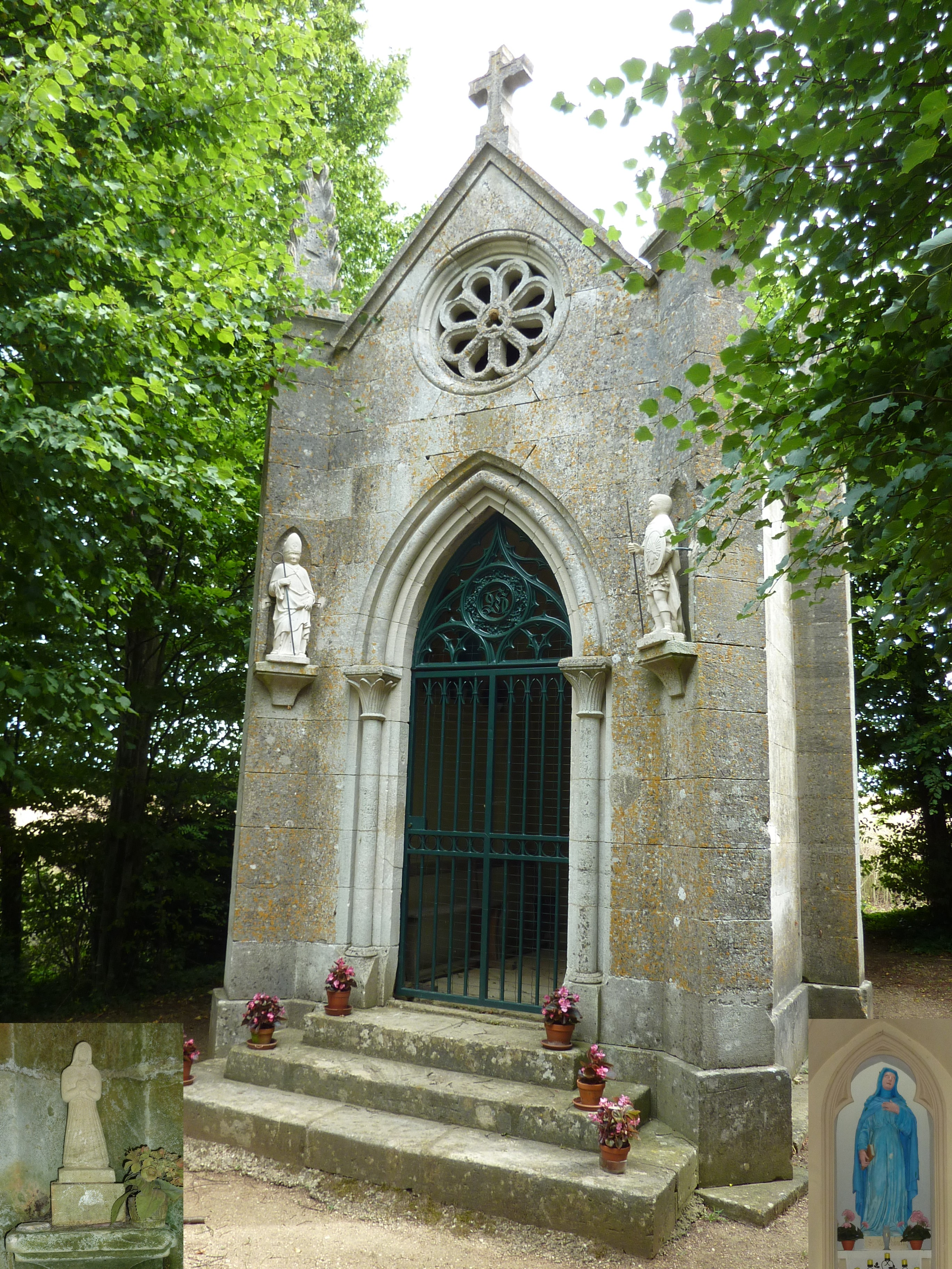 Chapelle Sainte-Menehould. En bas à droite, Statue de la sainte dans la chapelle En bas à droite, Statuette de la sainte dans la source